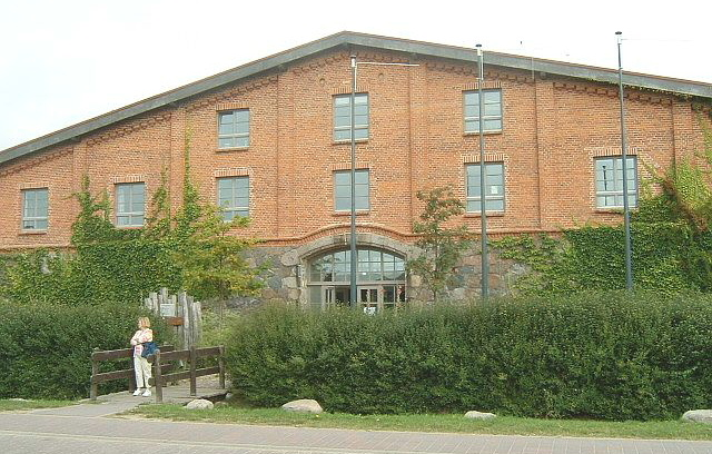 Größte Feldsteinscheune Deutschlands in Bollwick, Mecklenburg - Vorpommern, Rückseite